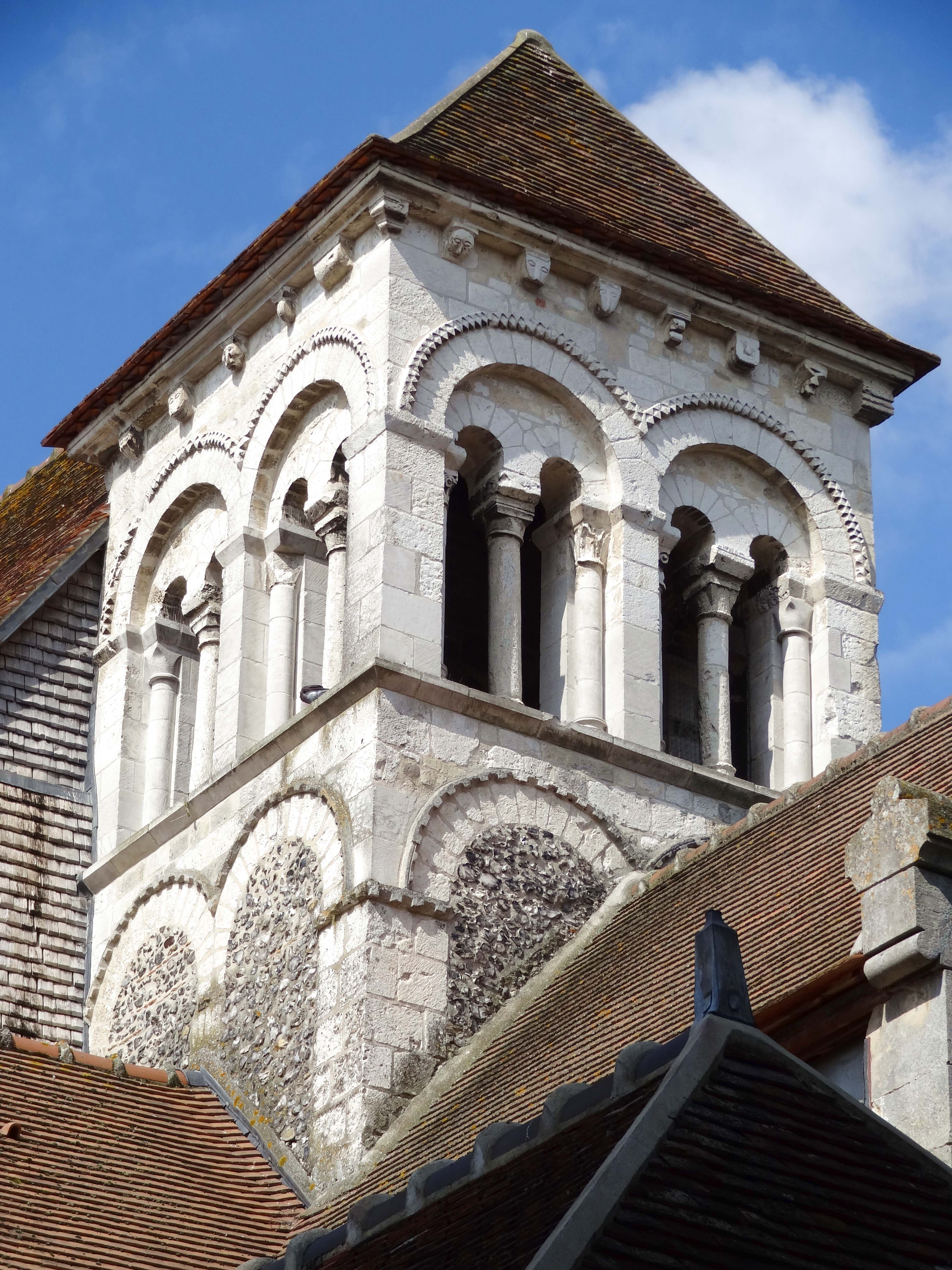 Église Notre-Dame de Marissel - voir titre.